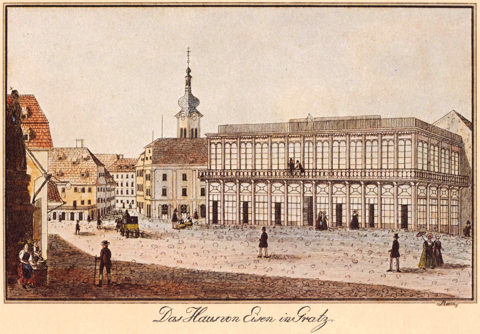 Eisernes Haus in Graz, Zeichnung von Vincenz Reim (1796-1858)